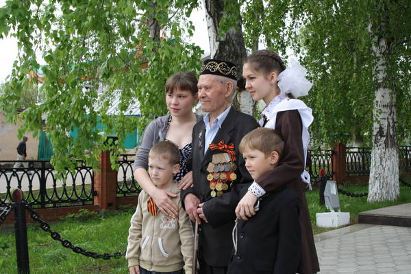 Татарча/tatarça: Оныклары белән